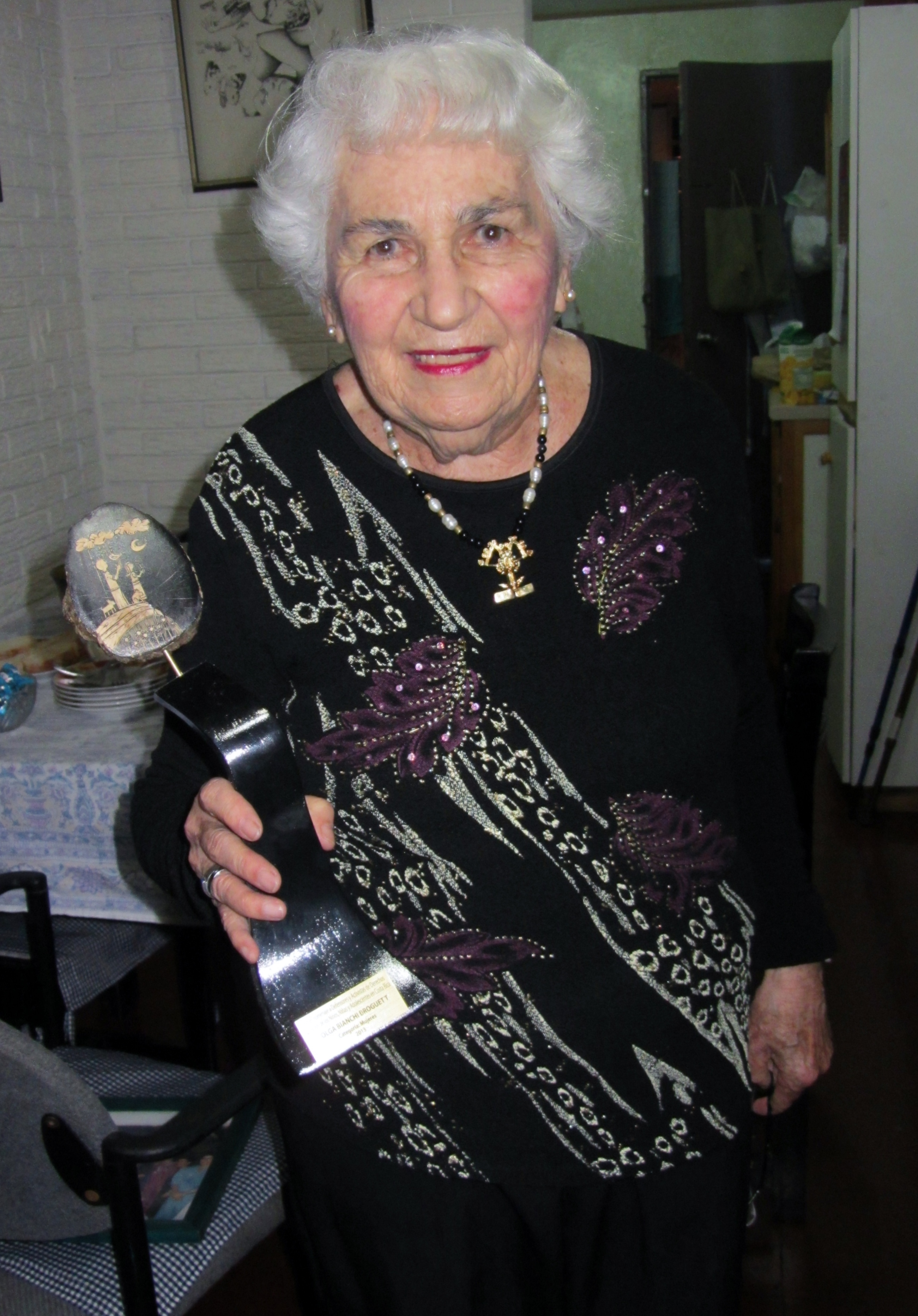 Olga Bianchi, defensora de derechos humanos, con un premio por su labor, San José, Costa Rica, 2013